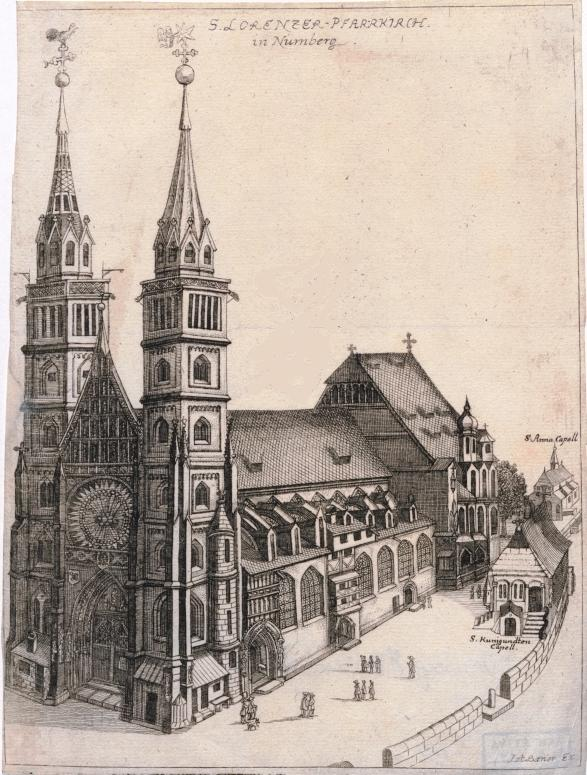 St. Lorenz-Kirche in Nürnberg um 1700